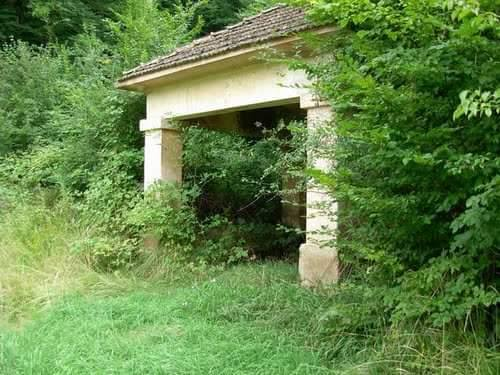 Туларска бања